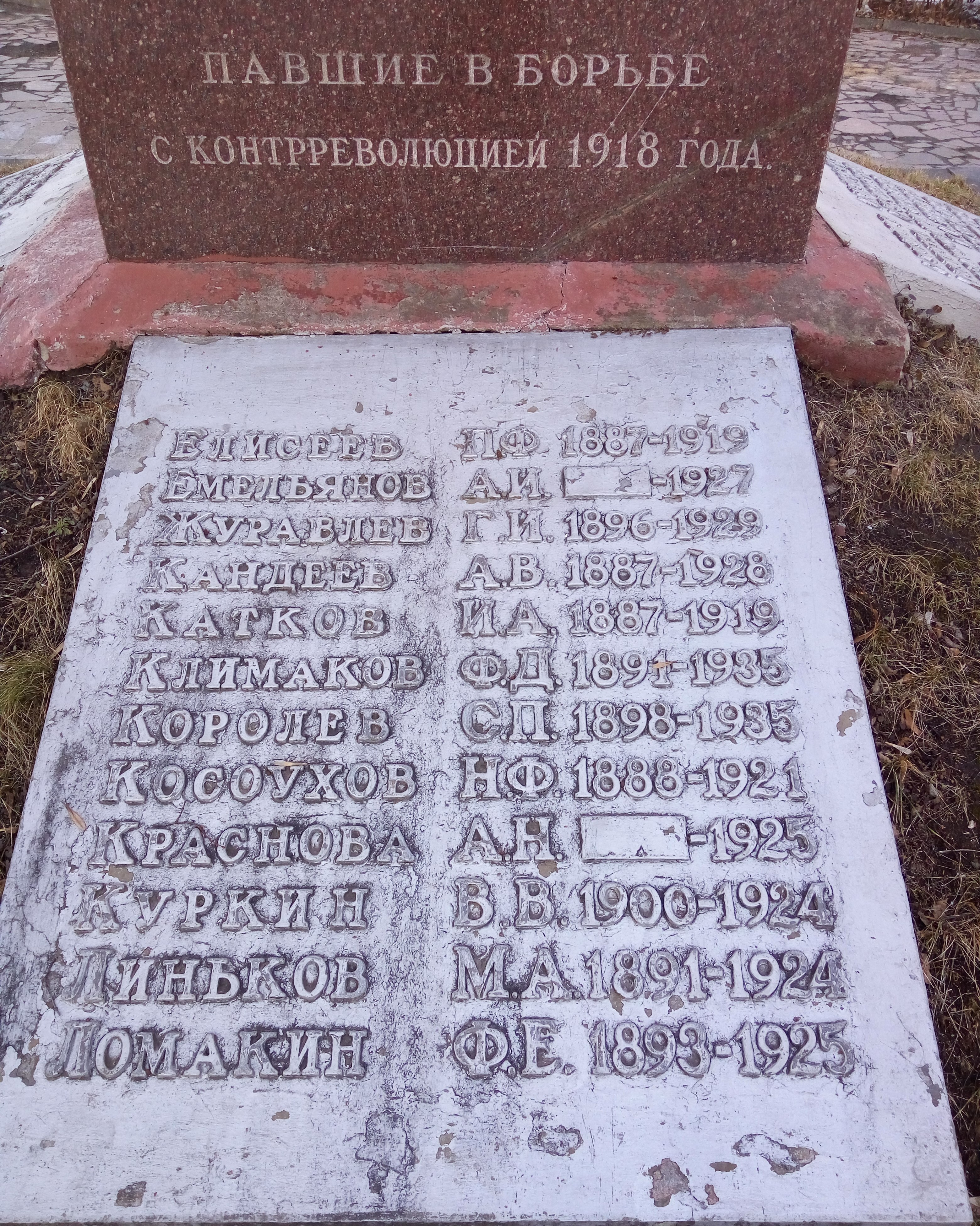 Стела героям гражданской войны 1917-1918 годов (Рязань), бронзовая плита с именами захороненных на Братском кладбище